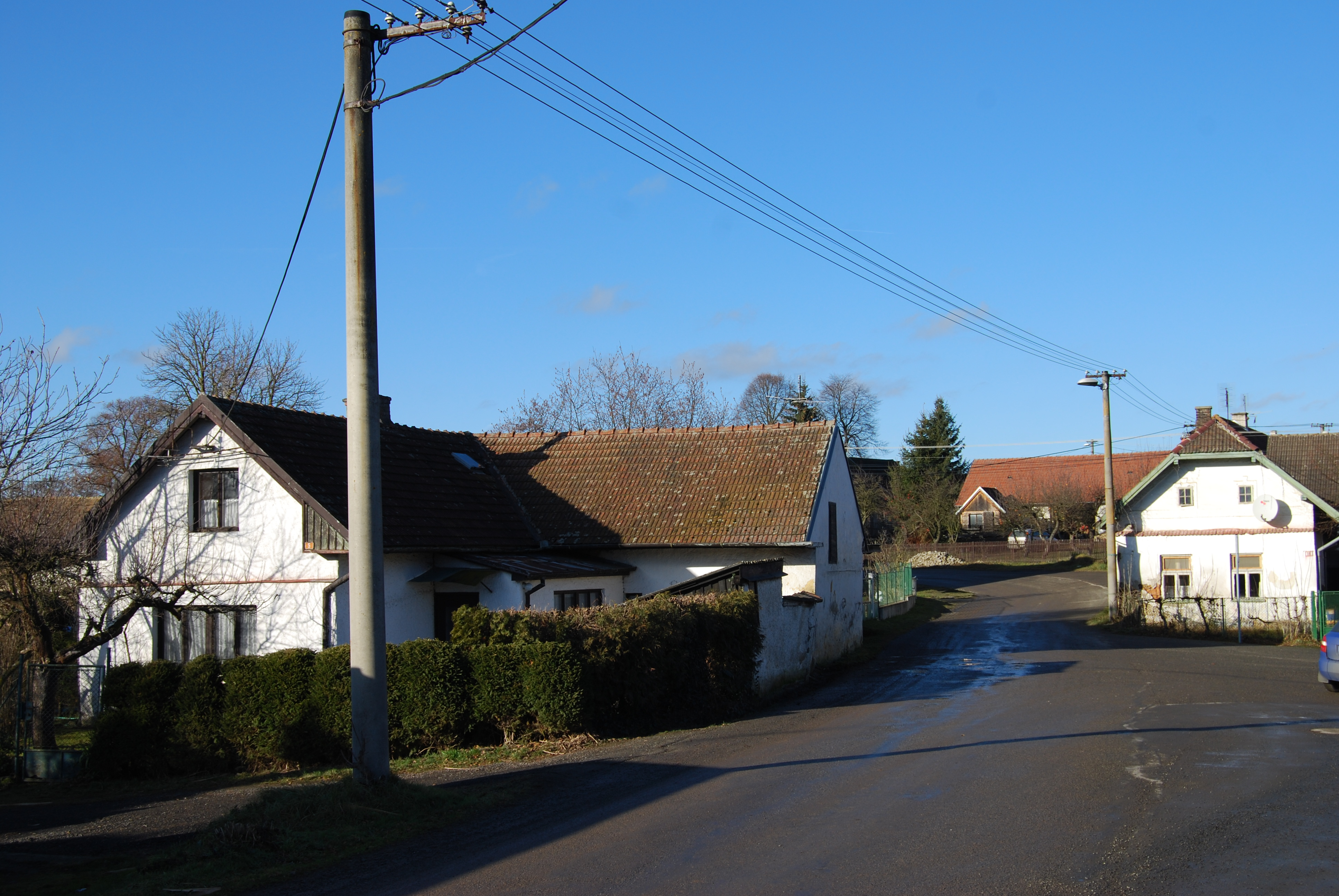 Pohled na část vesnice. Stoklasná Lhota. Okres Tábor. Česká republika. - OpenStreetMap (Info)